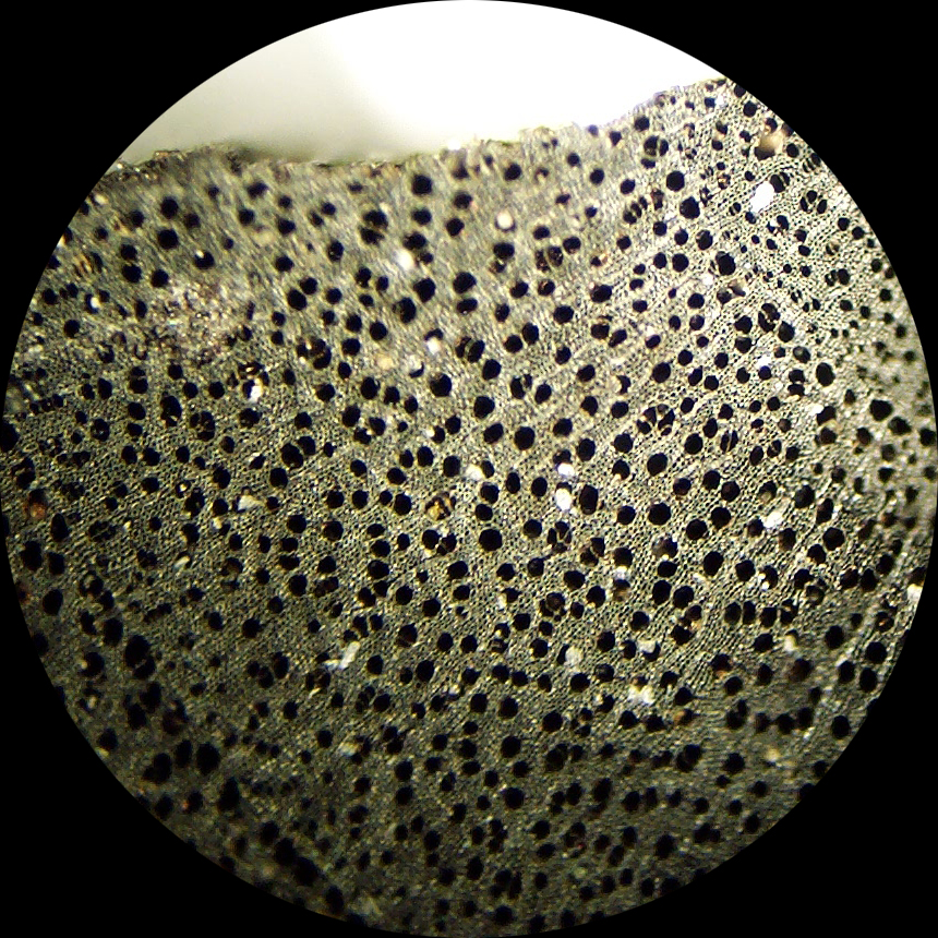 FR:Description Photographie au microscope d'un charbon de bois pour une étude anthracologique Photographe: Henri-Georges NATON Source: importé par le photographe Licence: GFDL-self